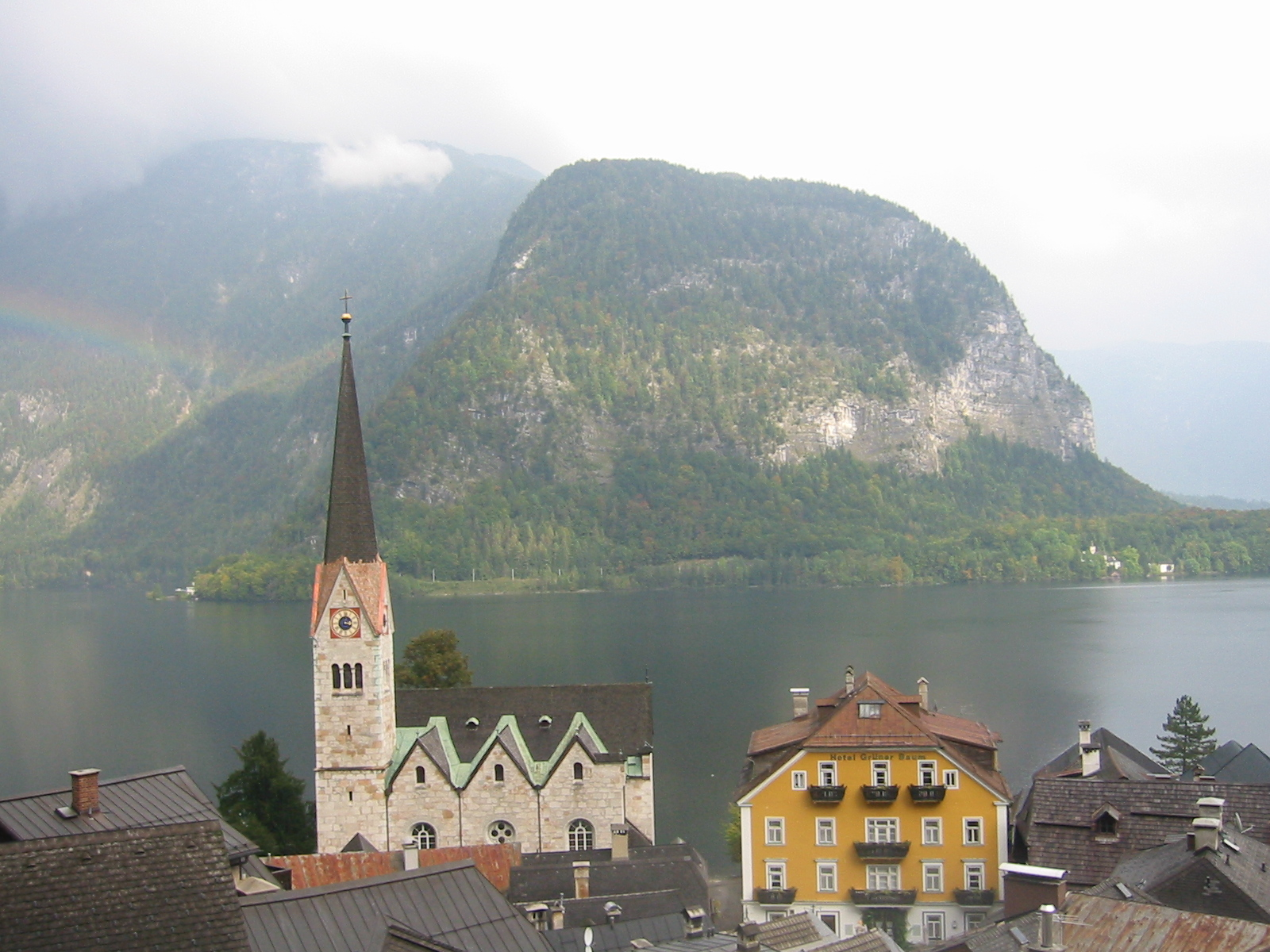 Blick auf Hallstatt und den Hallstätter See